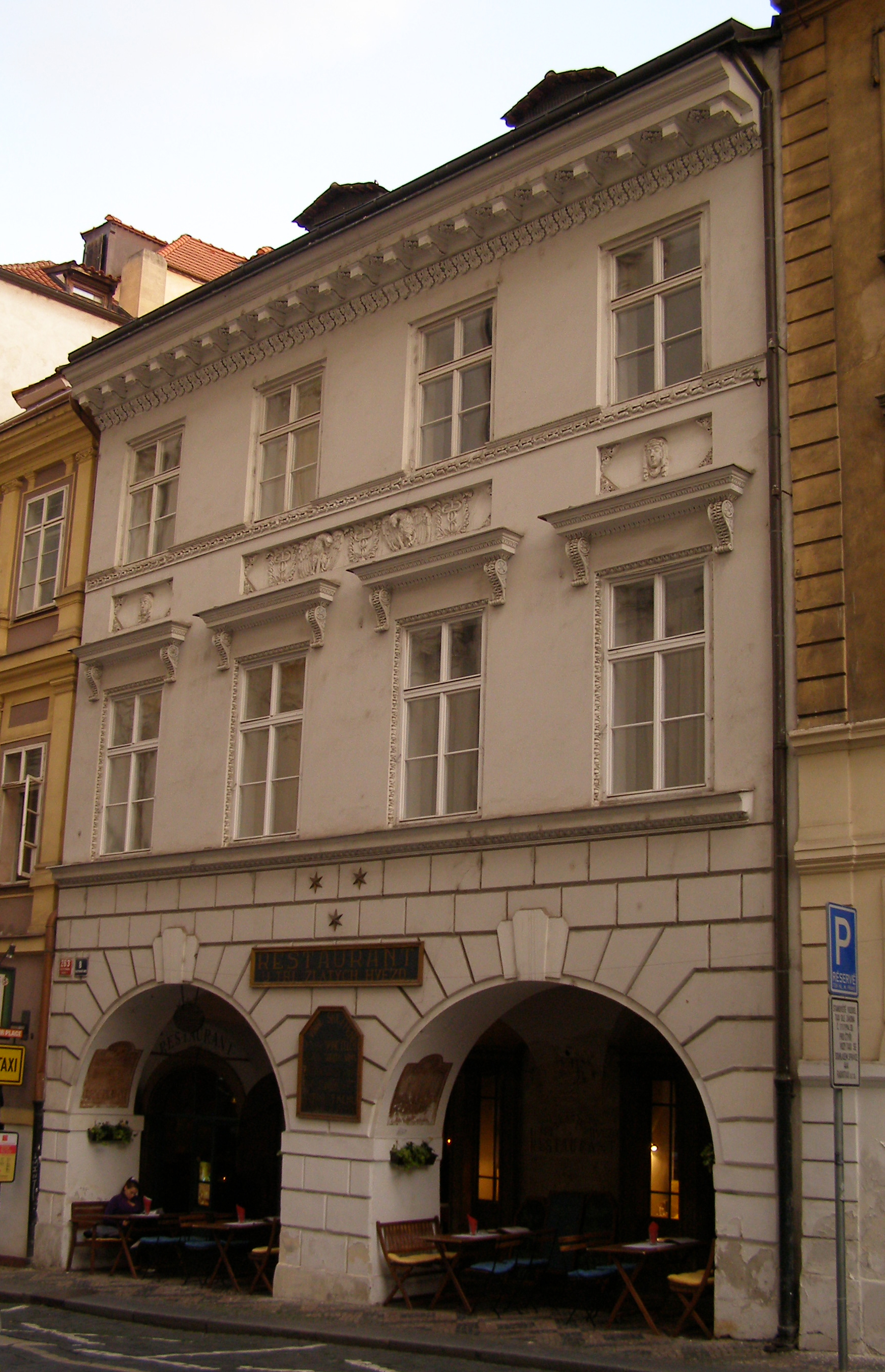 Měšťanský dům U tří zlatých hvězd (Malá Strana), Praha 1, Malostranské nám. 263/8, Malá Strana